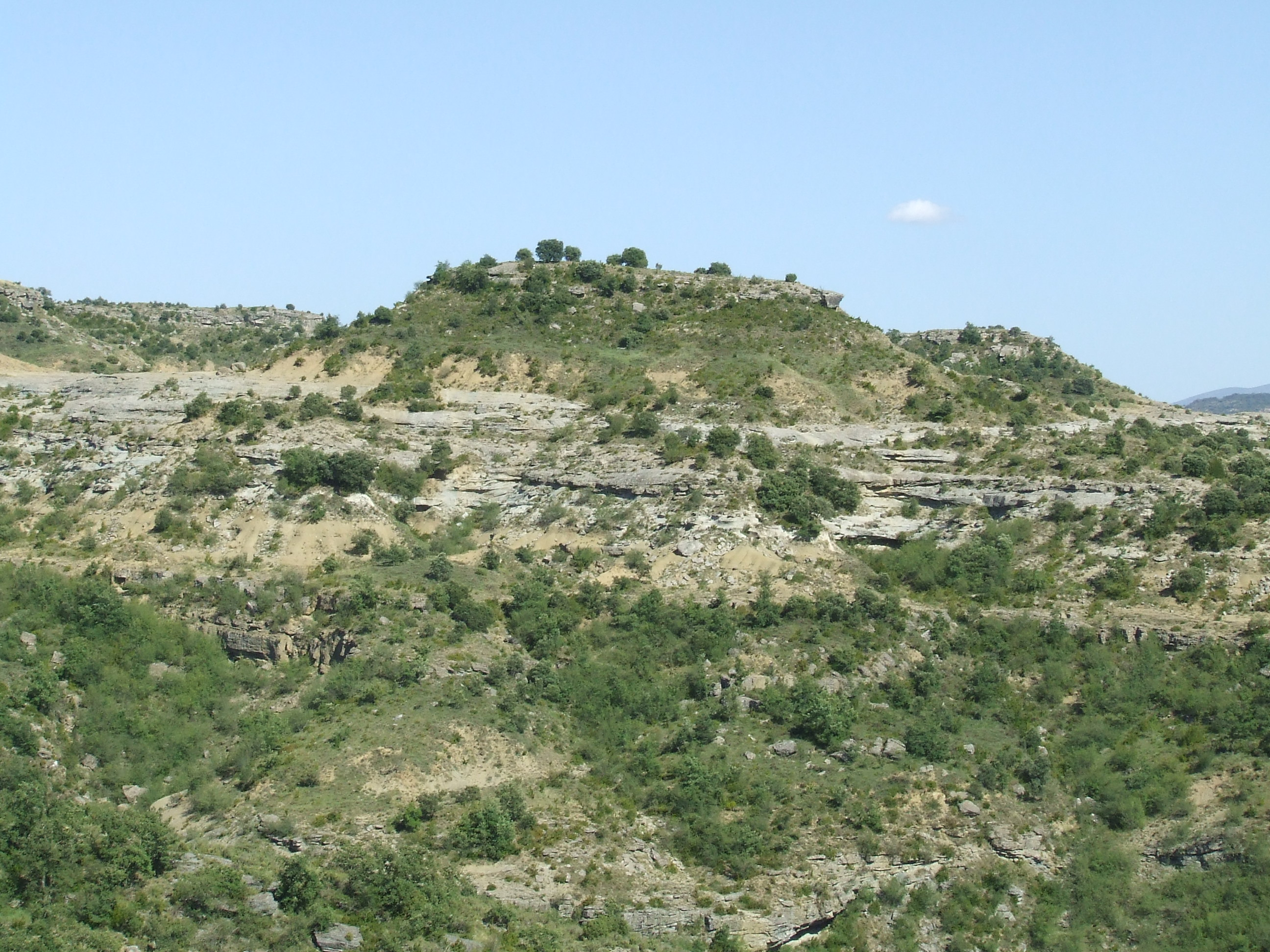 La Serra del Masiot (Fígols de Tremp, Tremp, Pallars Jussà)